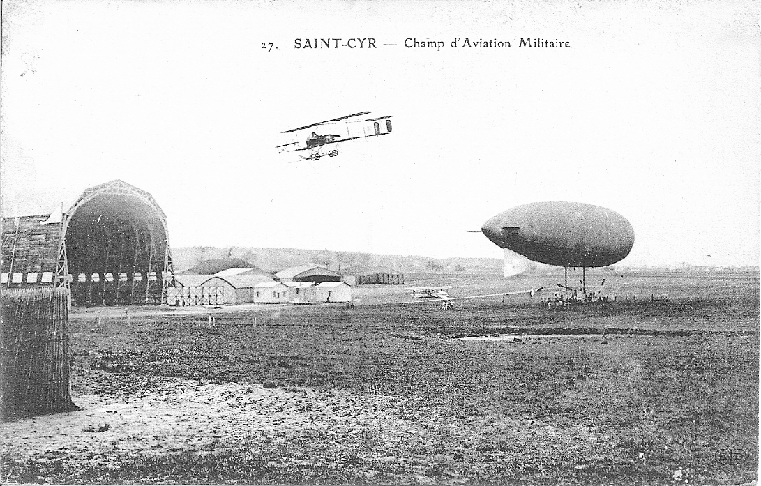 27. SAINT-CYR -- Champ d'Aviation Militaire, carte postale ancienne